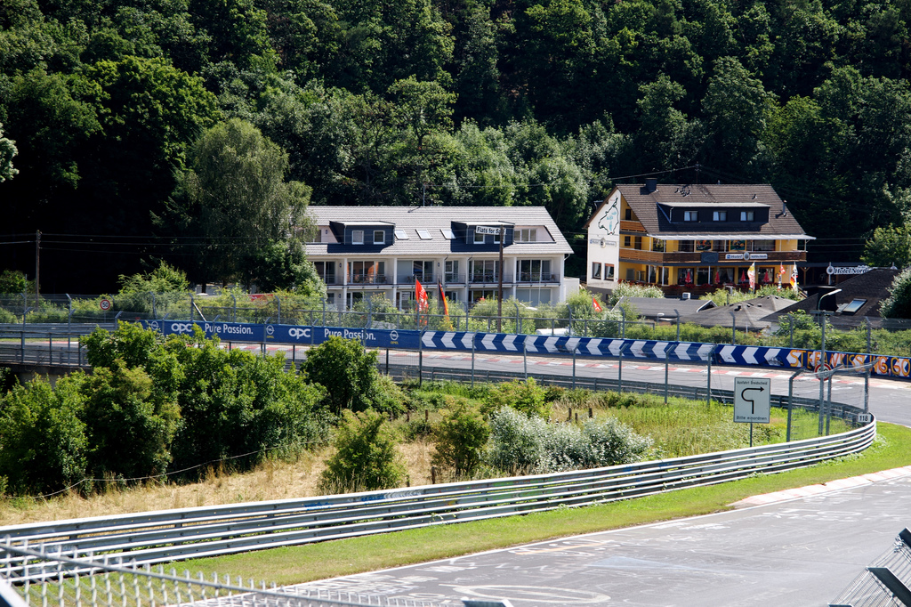 Nordschleife crossing Breidscheid Adenau